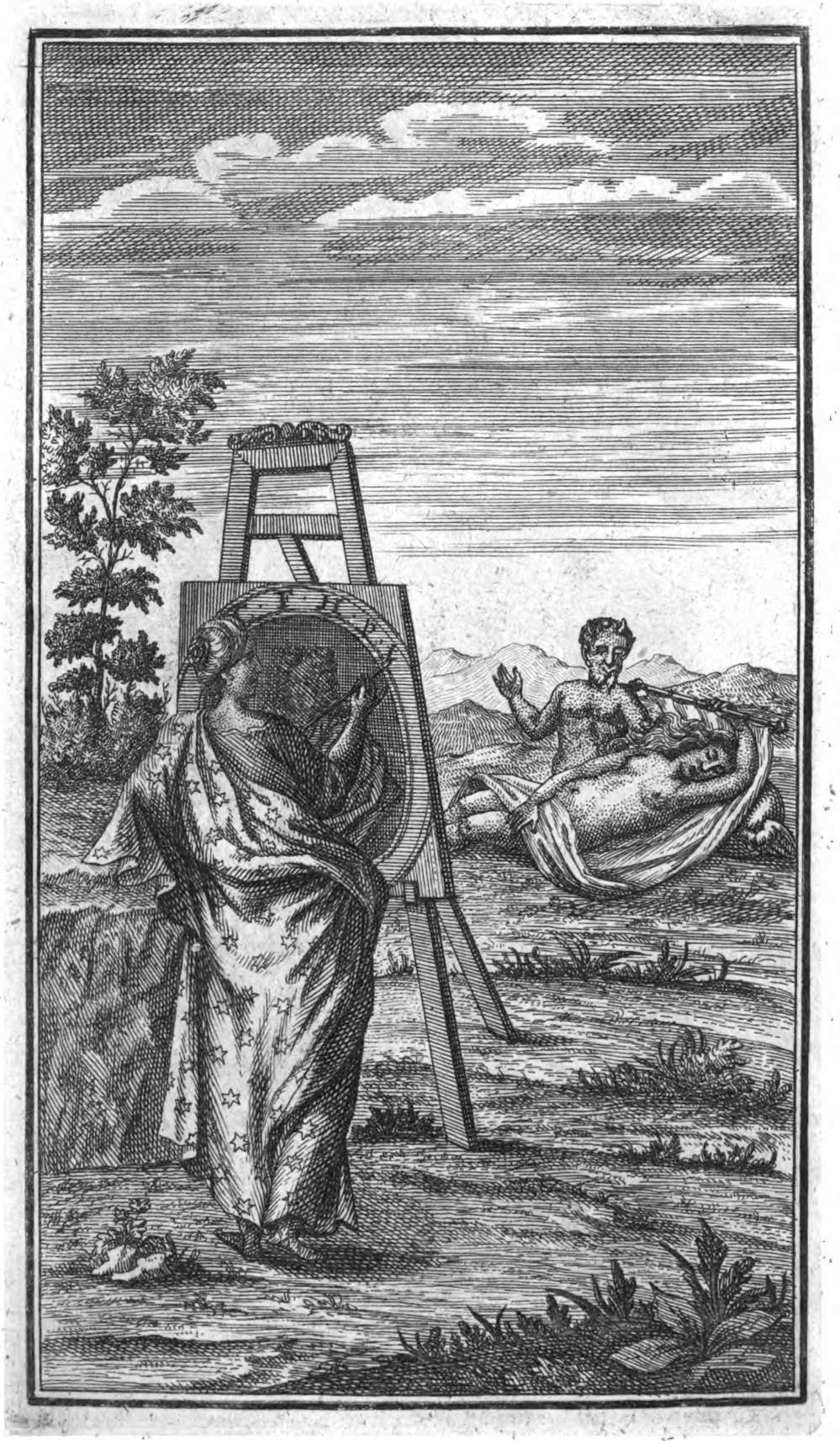 Frontispiz aus Band 3 von Picanders Ernst-Schertzhaffte und Satyrische Gedichte